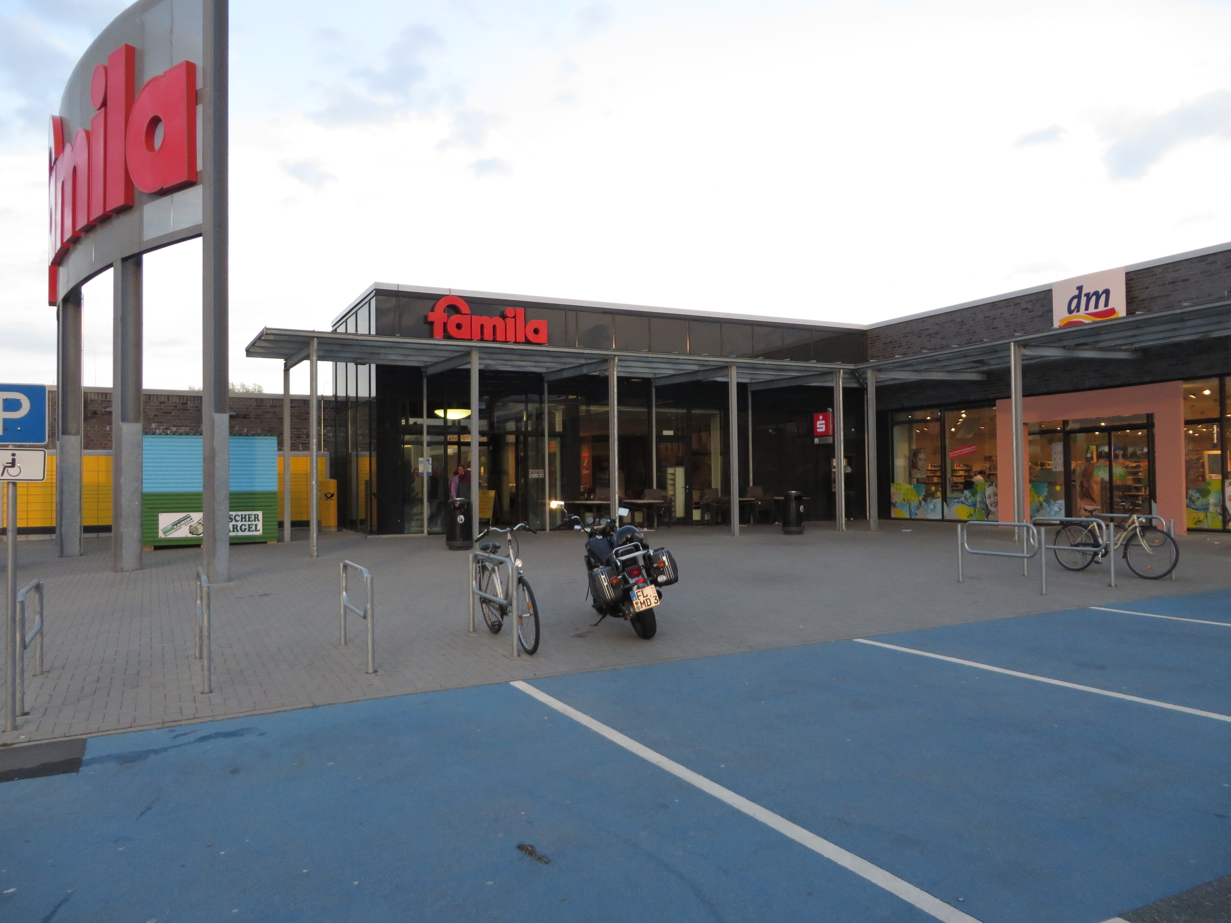 Schottweg-Zentrum (Flensburg-Mürwik Mai 2015), Bild 04